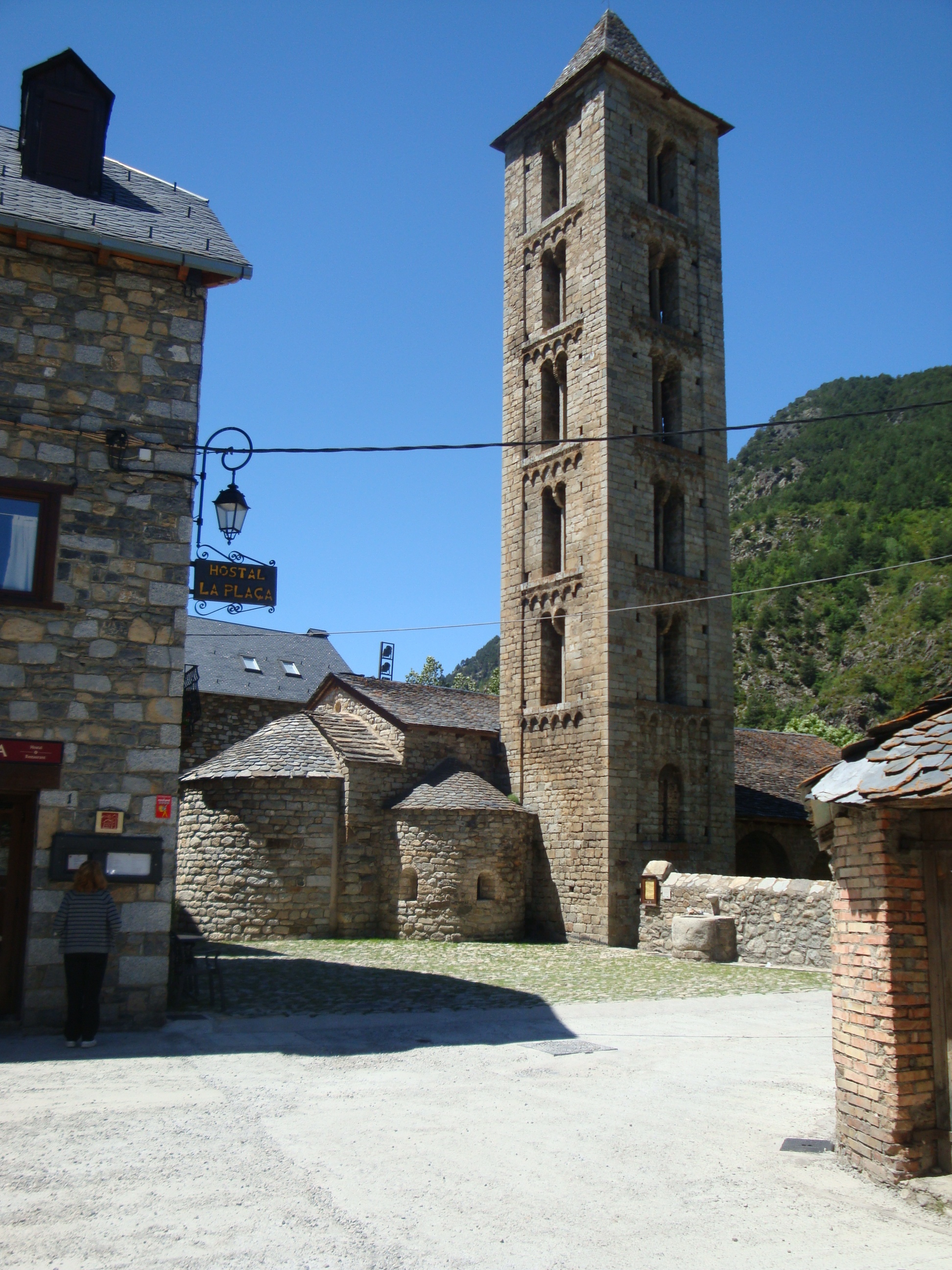 Iglesia románica de Eric La Vall